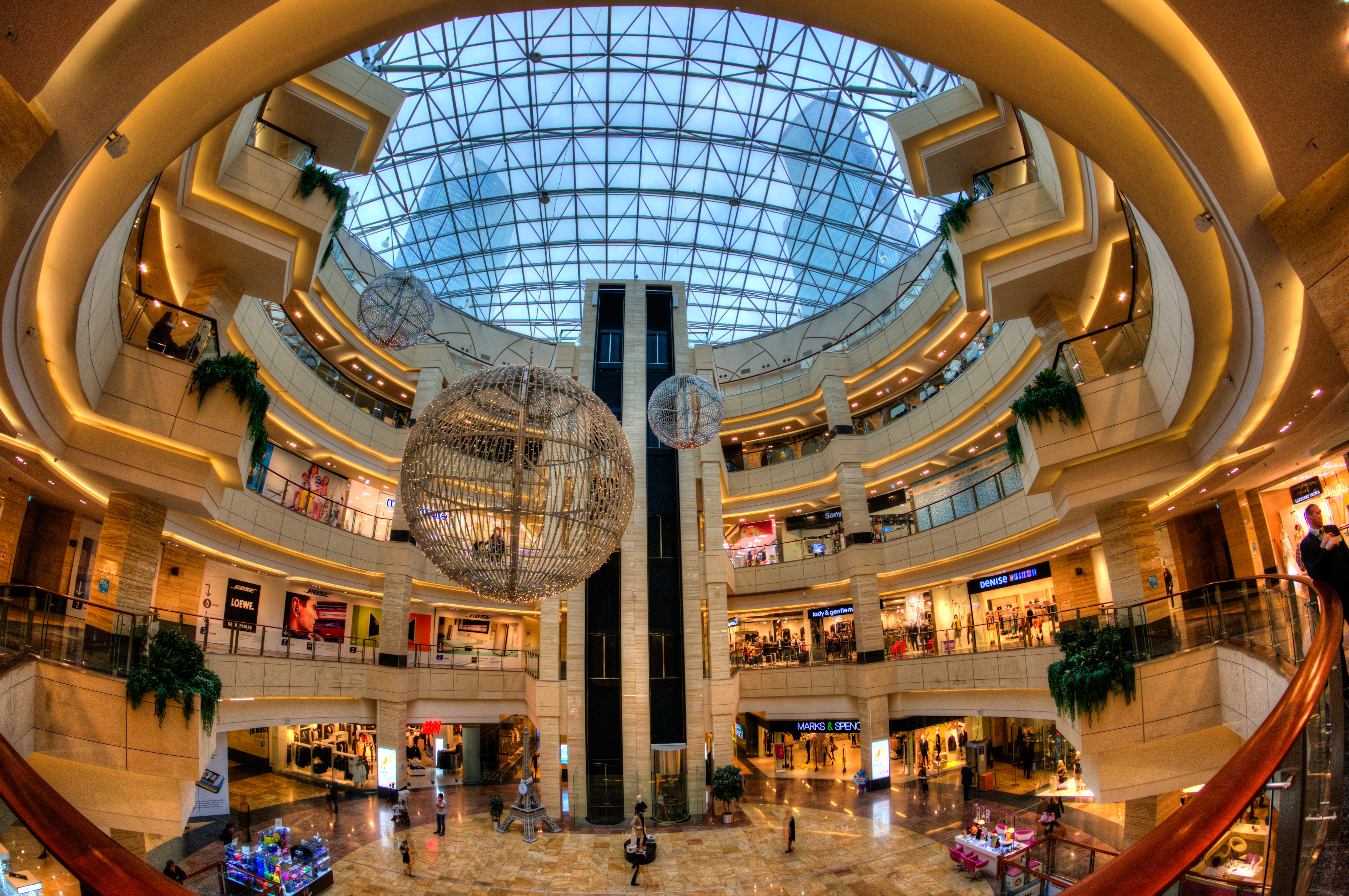 AFI Mall Moscow